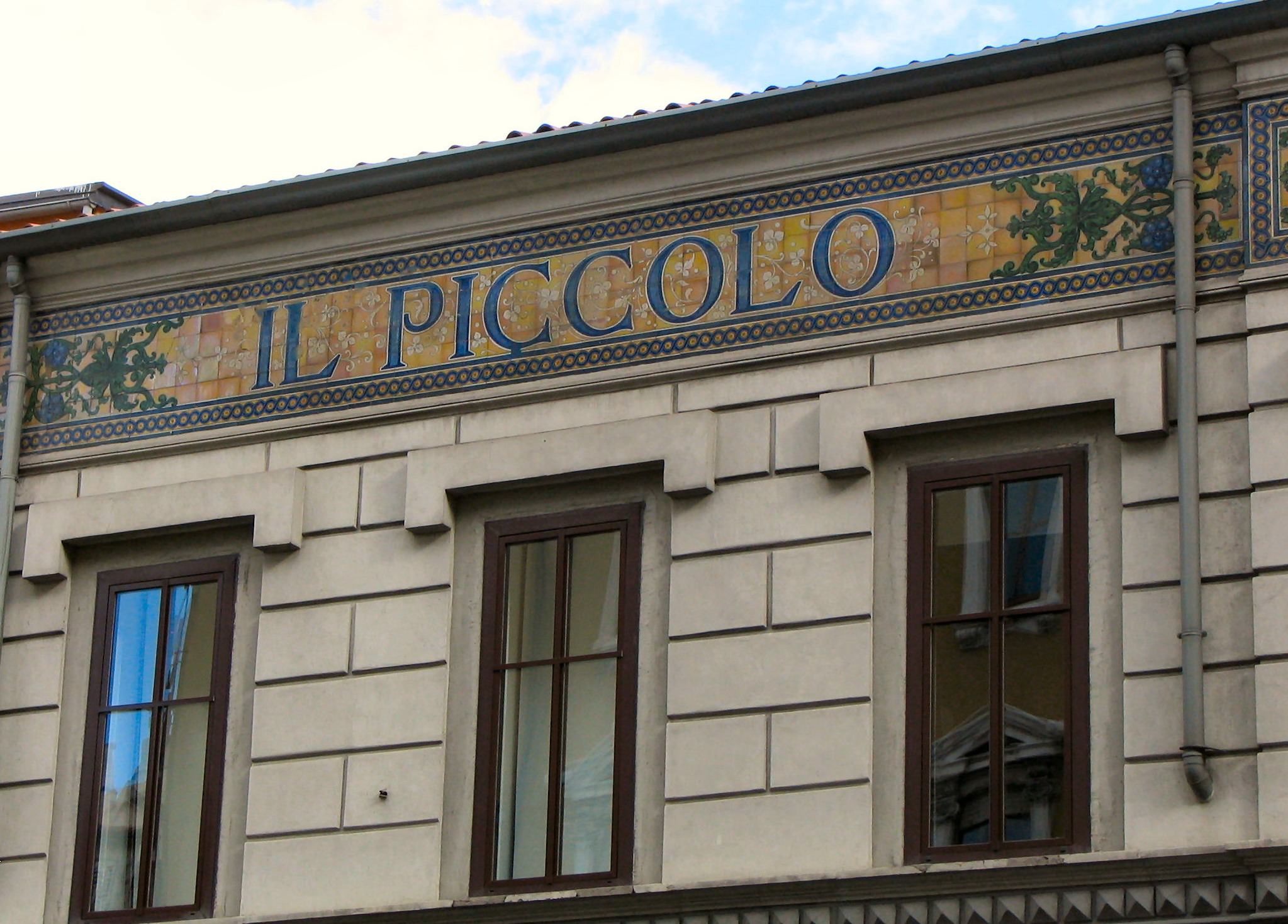 Vecchia sede del giornale triestine Il Piccolo in via Pellico